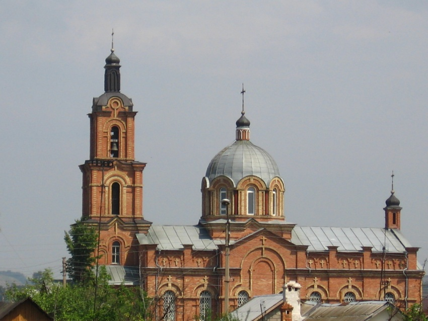 Собор в Октябрьском.